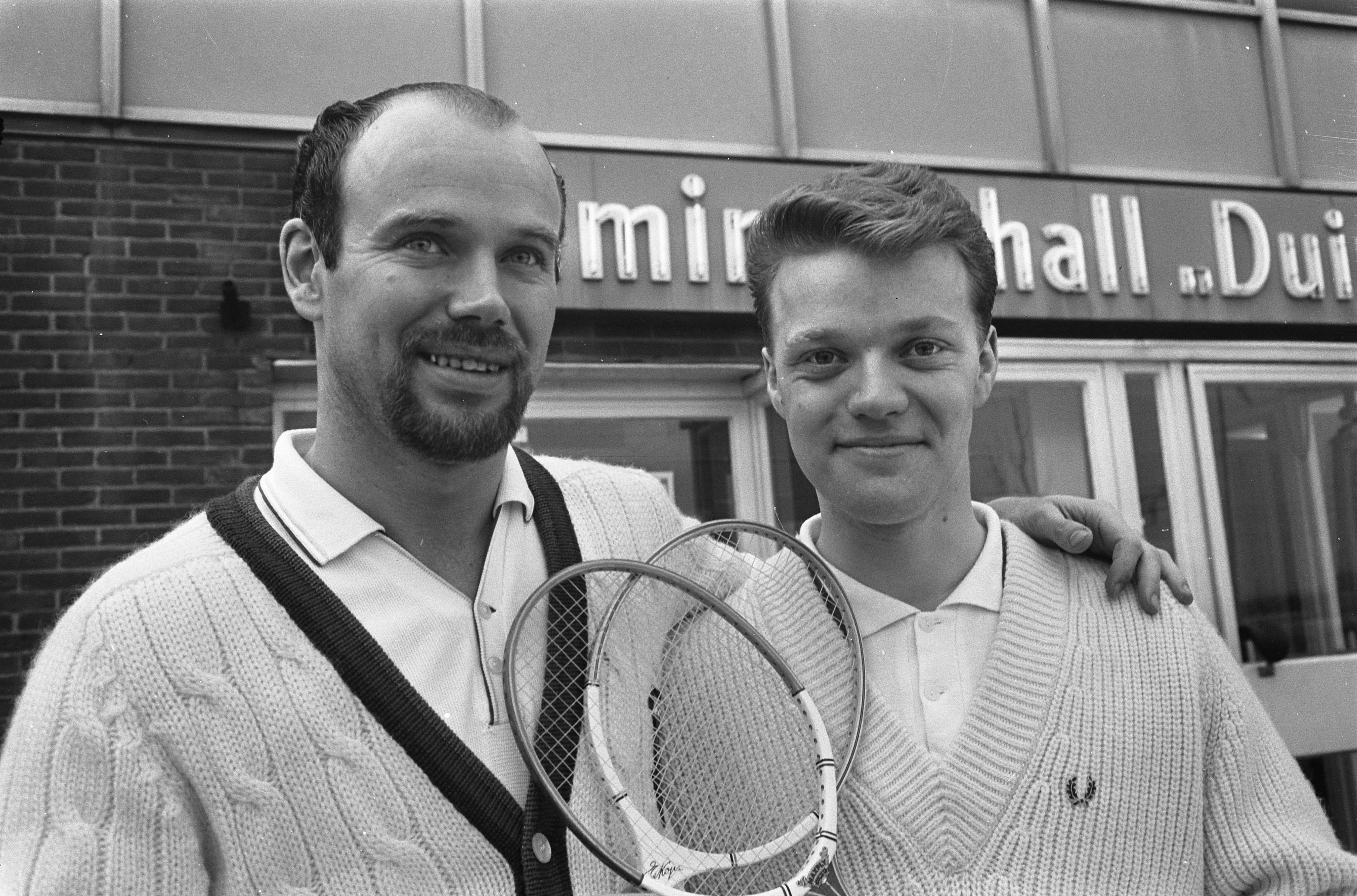 Collectie / Archief : Fotocollectie Anefo Reportage / Serie : [ onbekend ] Beschrijving : Badminton, Internationale kampioenschappen te Haarlem, het Deense herendubbel Kops (l) en Bacher Datum : 10 februari 1968 Locatie : Haarlem Trefwoorden : BADMINTON, KAMPIOENSCHAPPEN Fotograaf : Koch, Eric / Anefo Auteursrechthebbende : Nationaal Archief Materiaalsoort : Negatief (zwart/wit) Nummer archiefinventaris : bekijk toegang 2.24.01.05 Bestanddeelnummer : 921-0629